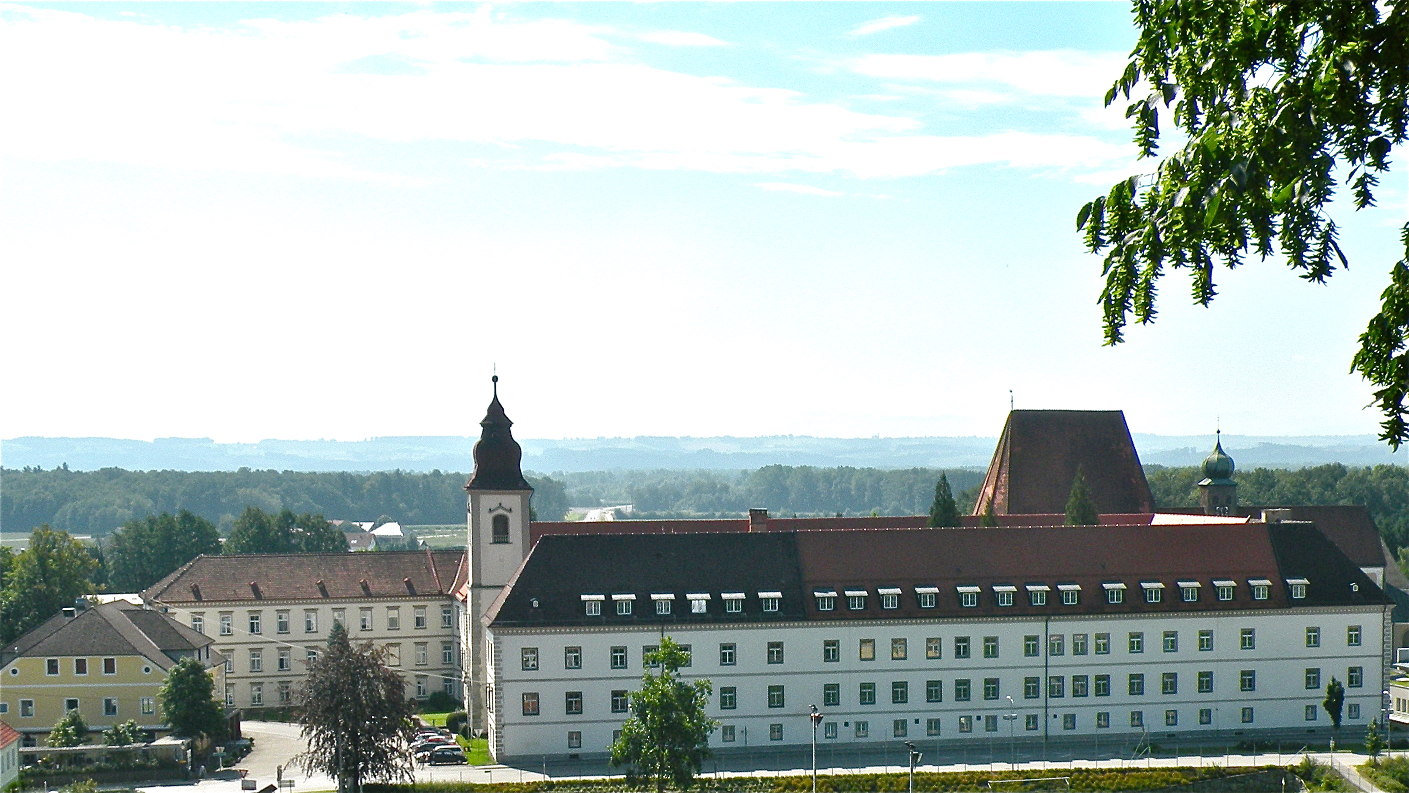 Ansicht des ehemaligen Zisterzienserstifts Baumgartenberg im Bezirk Perg in Oberösterreich